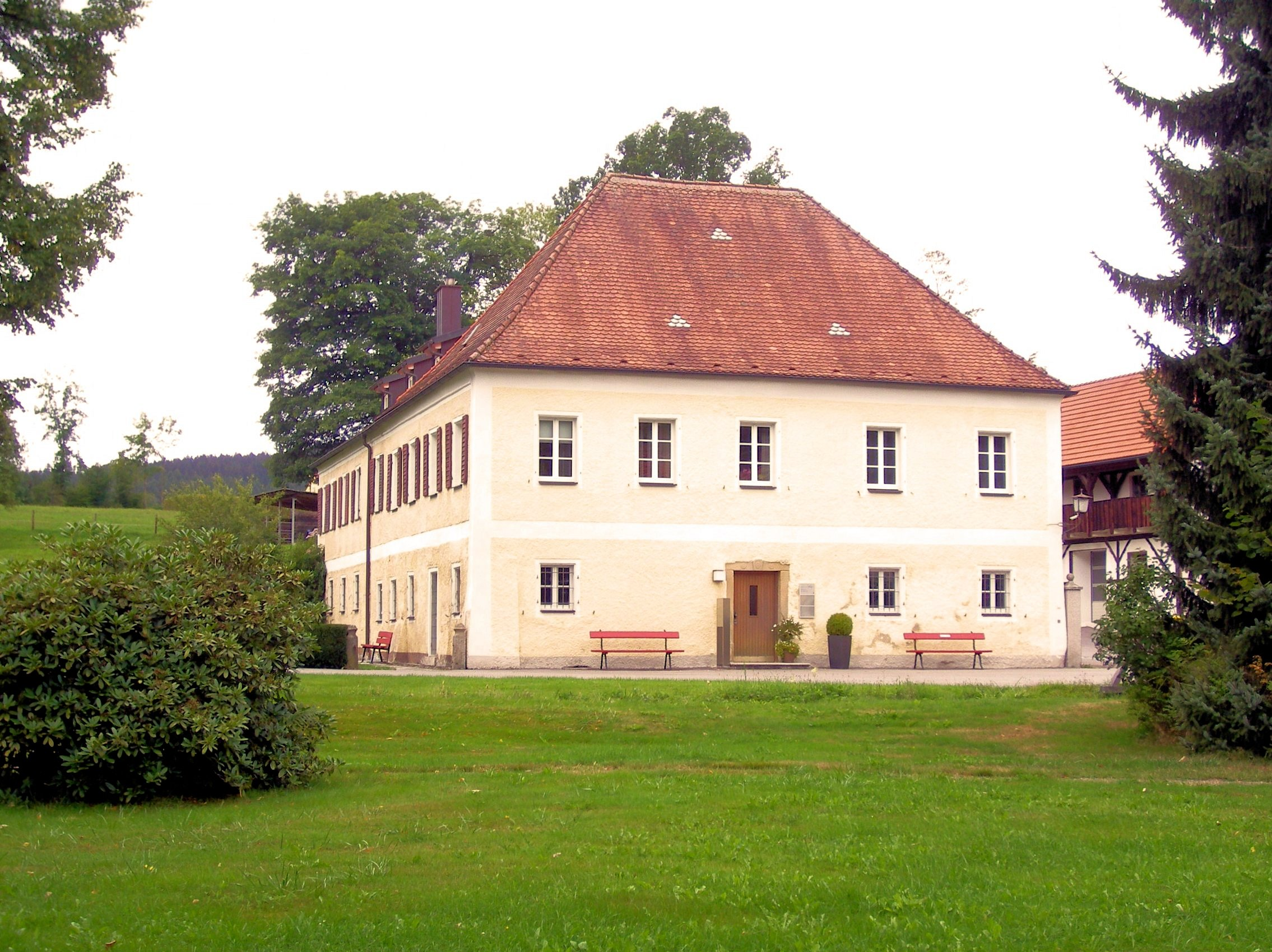 Pleystein: Gut Peugenhammer, Herrenhaus